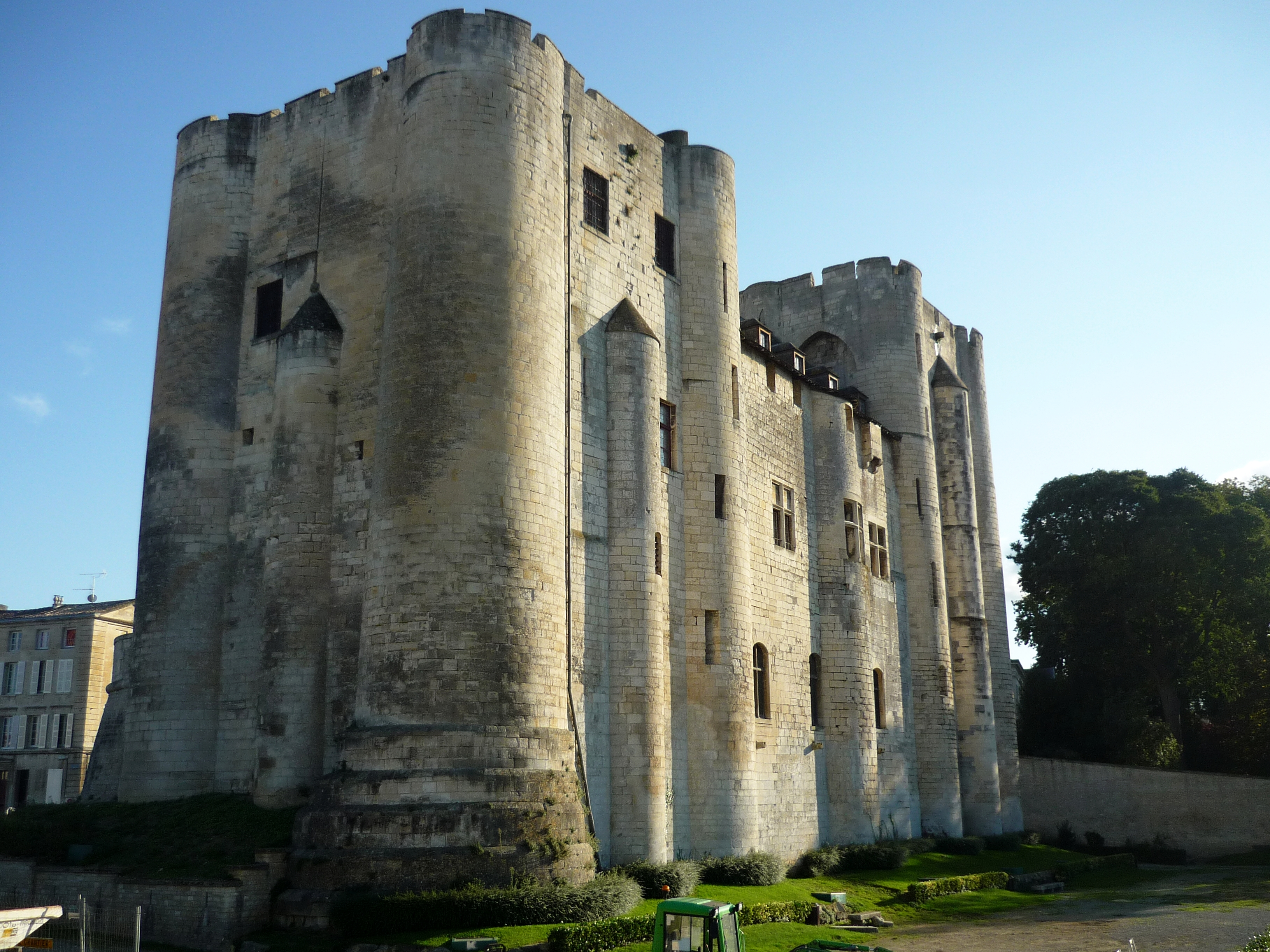 Donjon de Niort, côté nord-ouest .